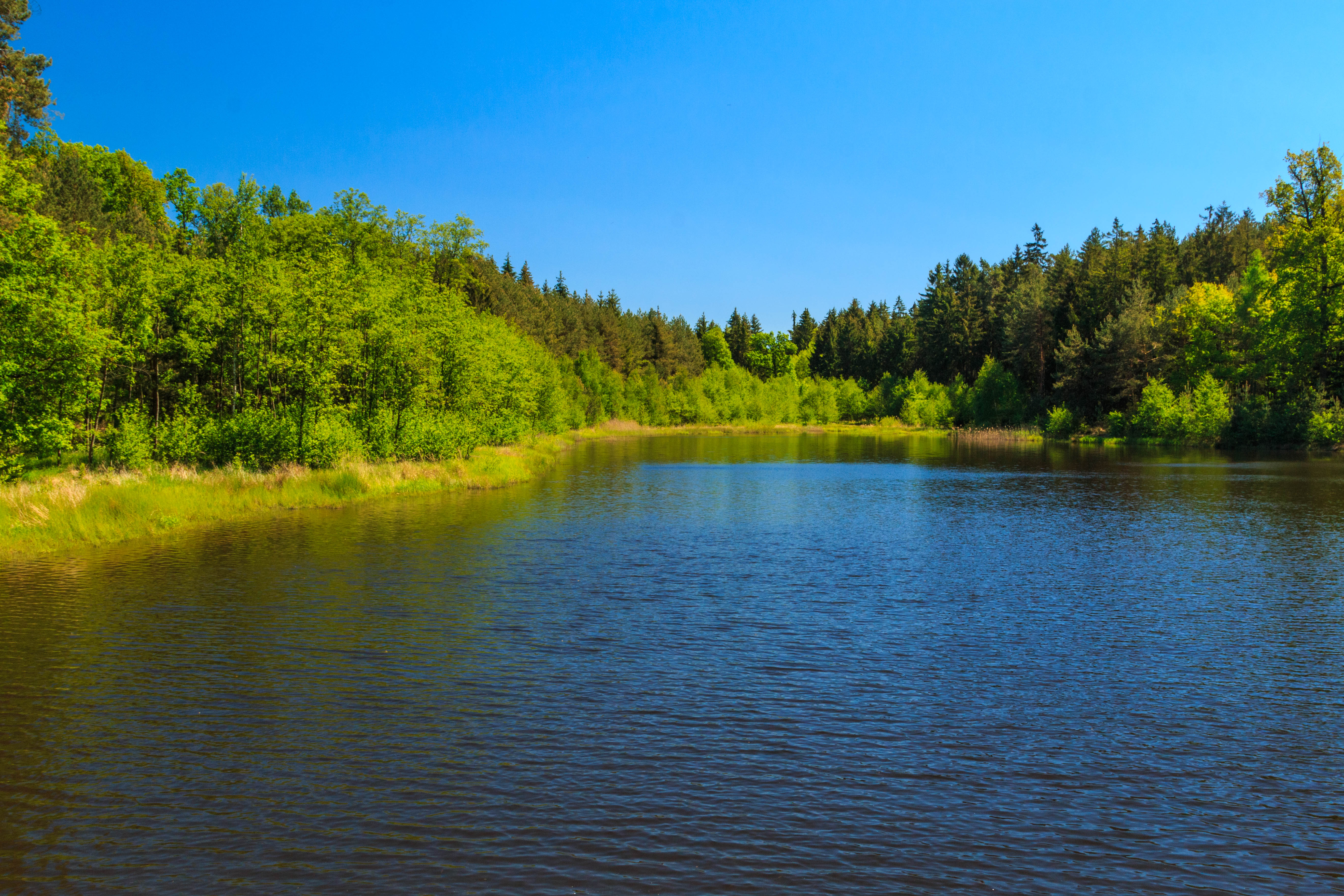 Rybník Cesta myslivců Project: Vodstvo.